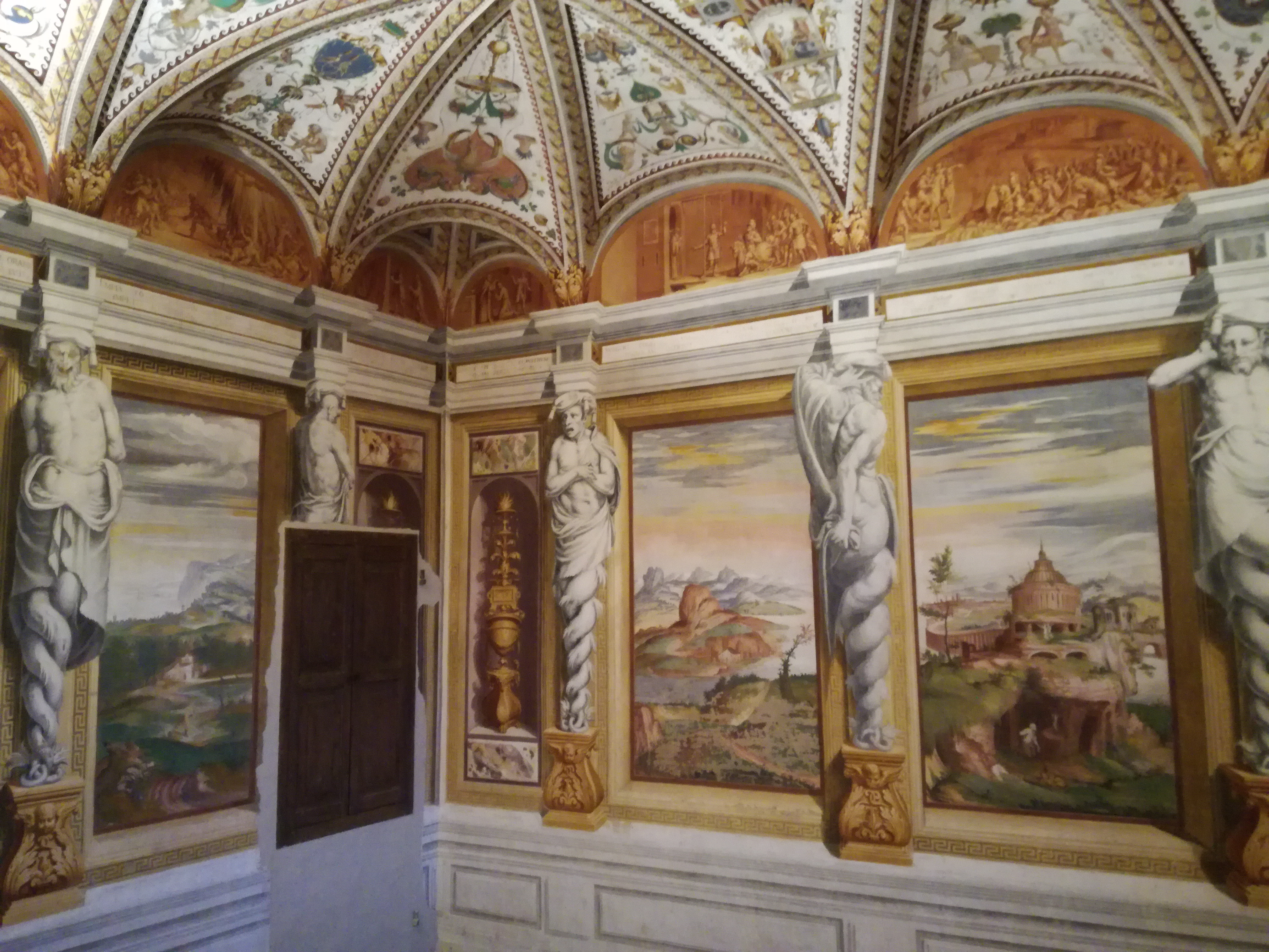 Studiolo, Autori vari, 1550 - 1580 ca., Museo della Certosa di Pavia